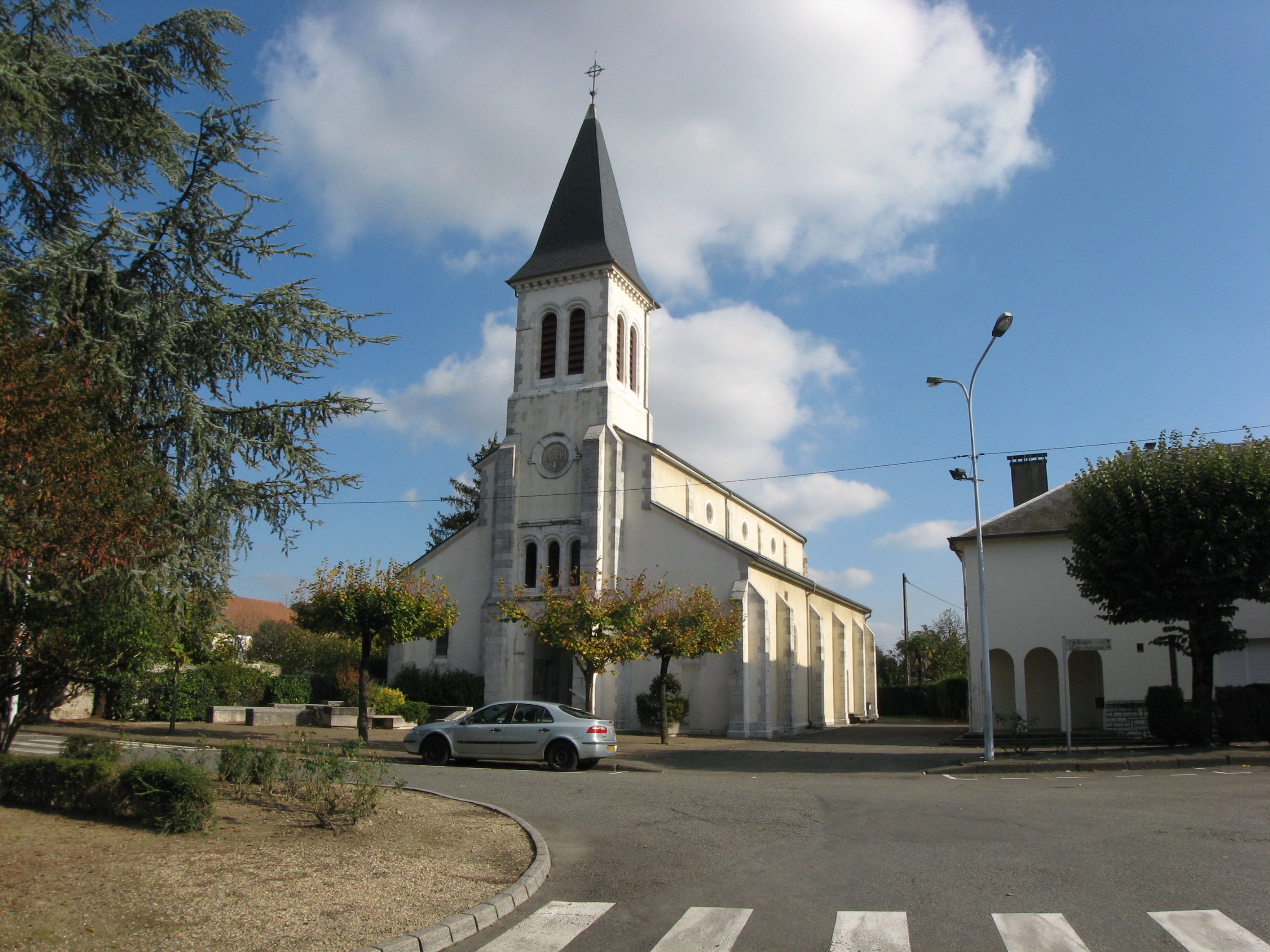 Vue de l'église d'Artix (Pyrénées Atlantiques) Pyrénées).